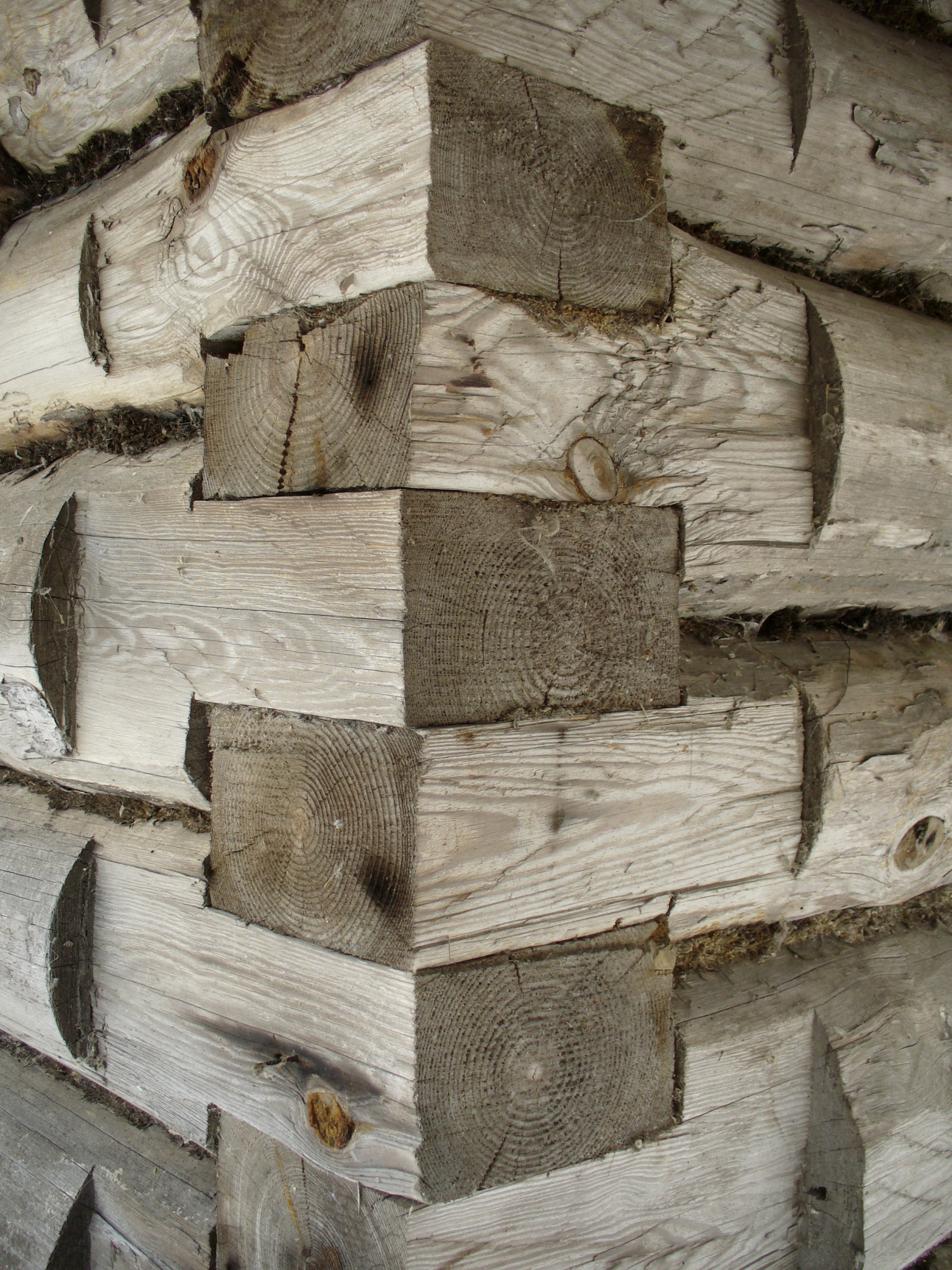 Угол сруба, выполненный рубкой без остатка (чистый угол) в лапу